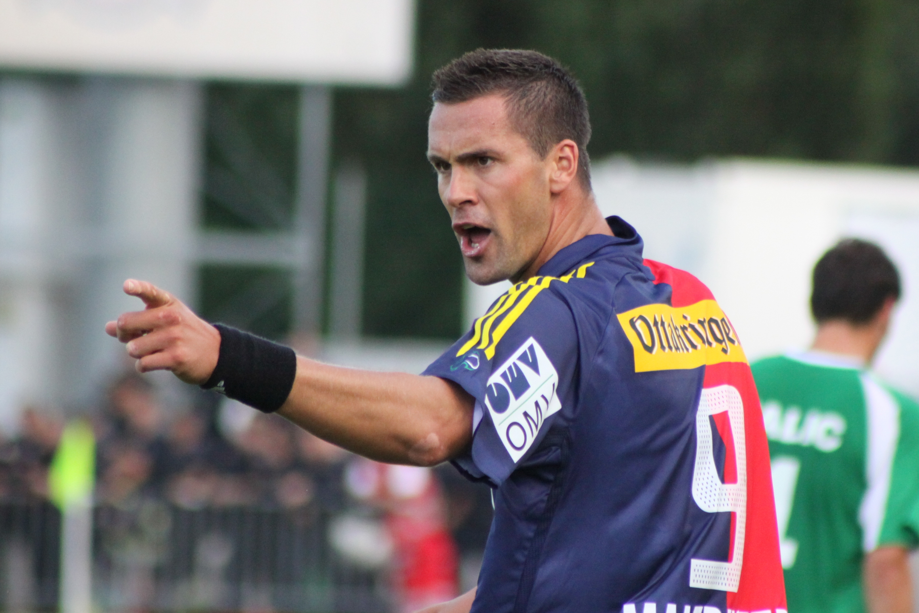 Stefan Maierhofer - SK Rapid Wien (5)